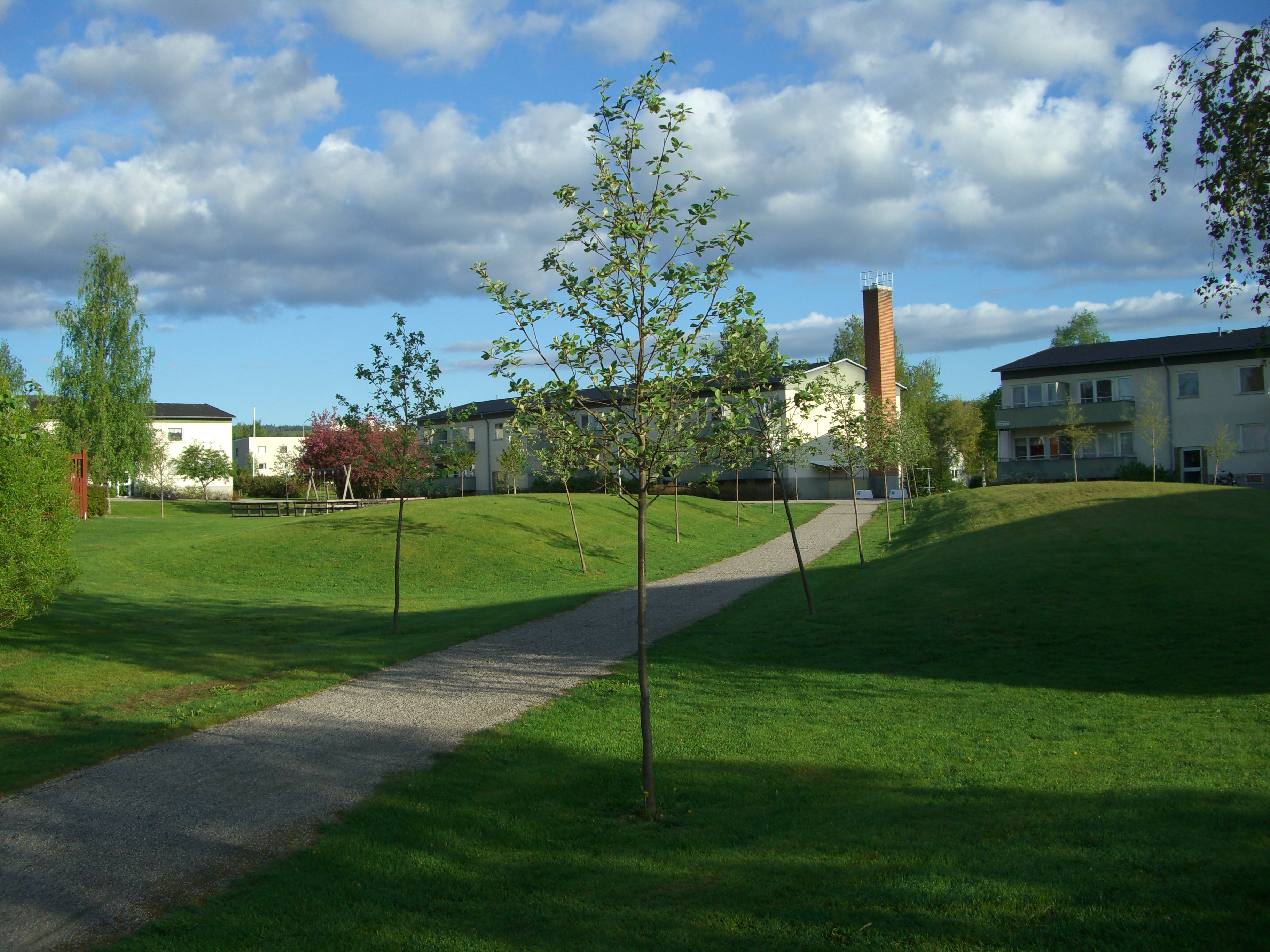 Åsparken; Arbrå; Bollnäs, Sweden.